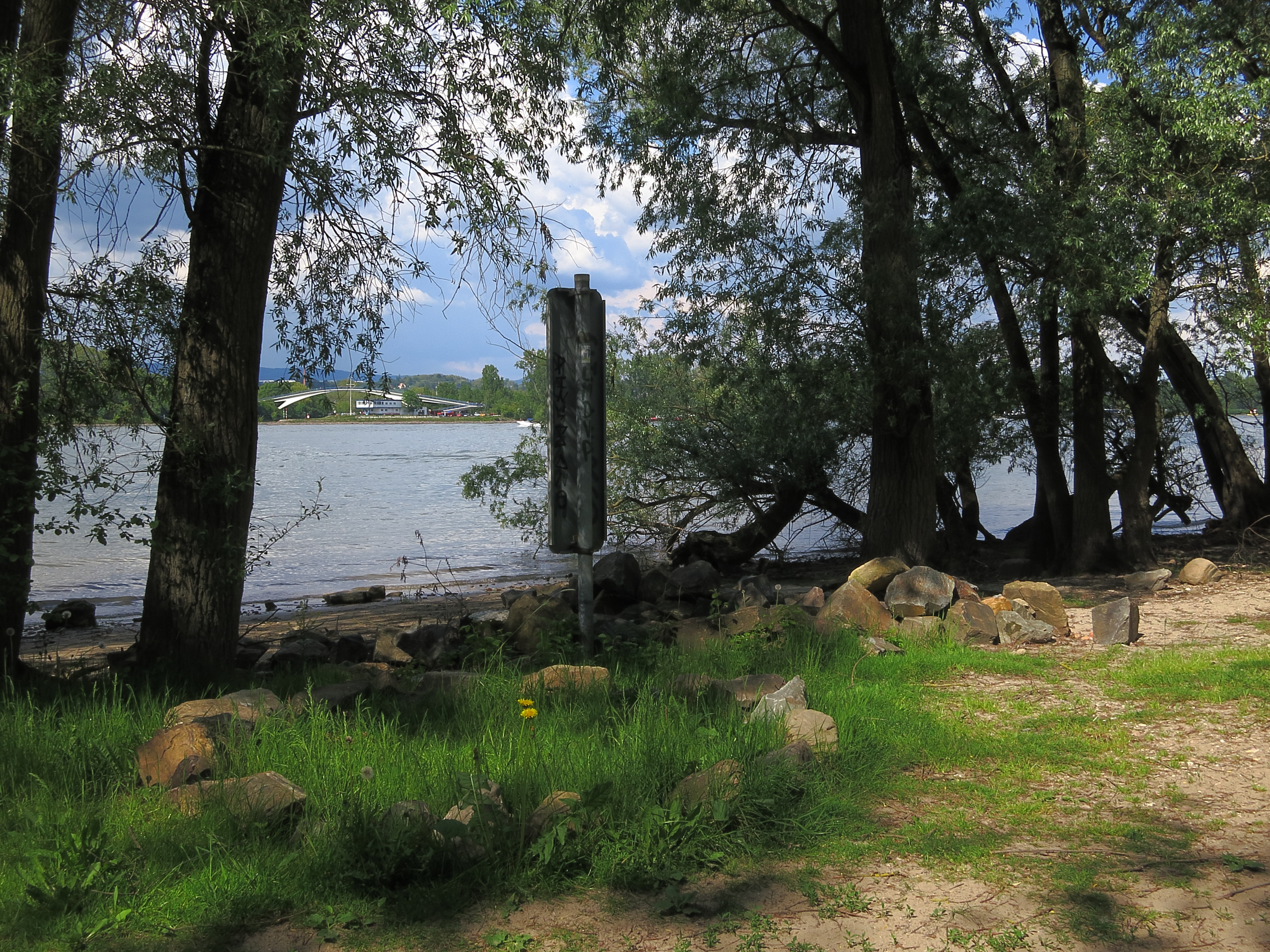 (NSG:RP-7315-053)_Mombacher Rheinufer NSG Mombacher Rheinufer, von der Budenheimer Seite gesehen. Die Stelle ist im Sommer ein vielbesuchter Badeplatz, bekannt als "Mombeach".